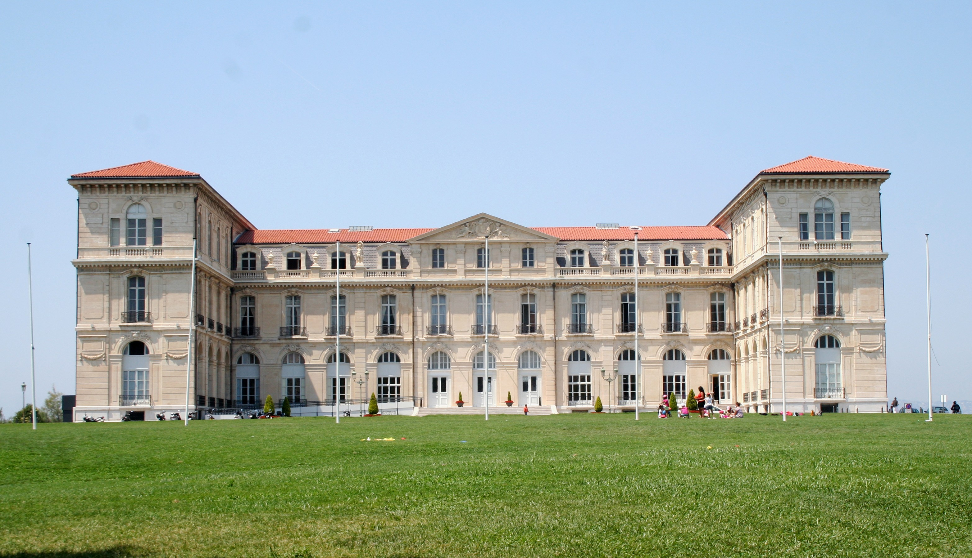 Le Palais du Pharo à Marseille (7e).